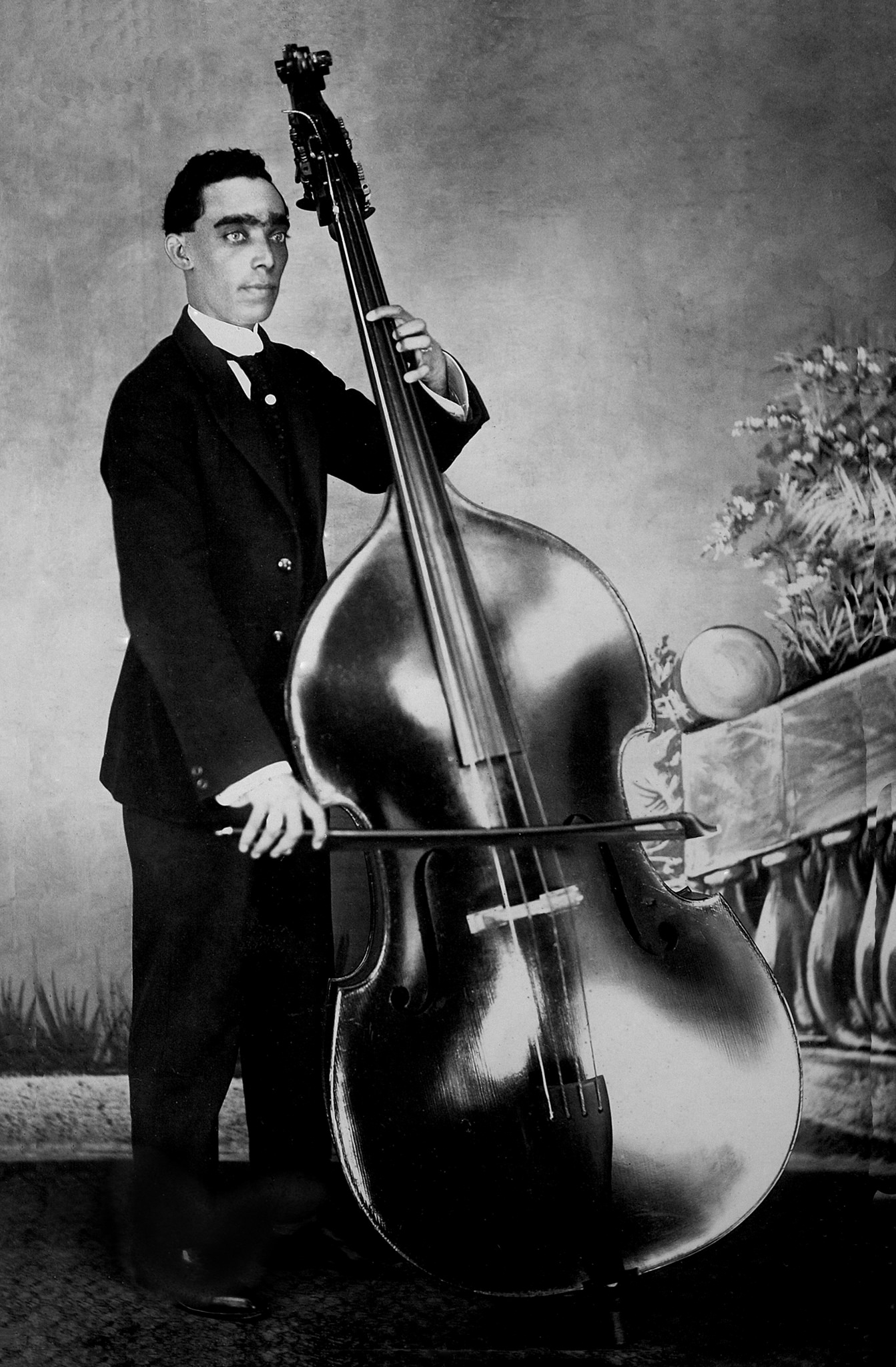 Louro e seu contra-baixo